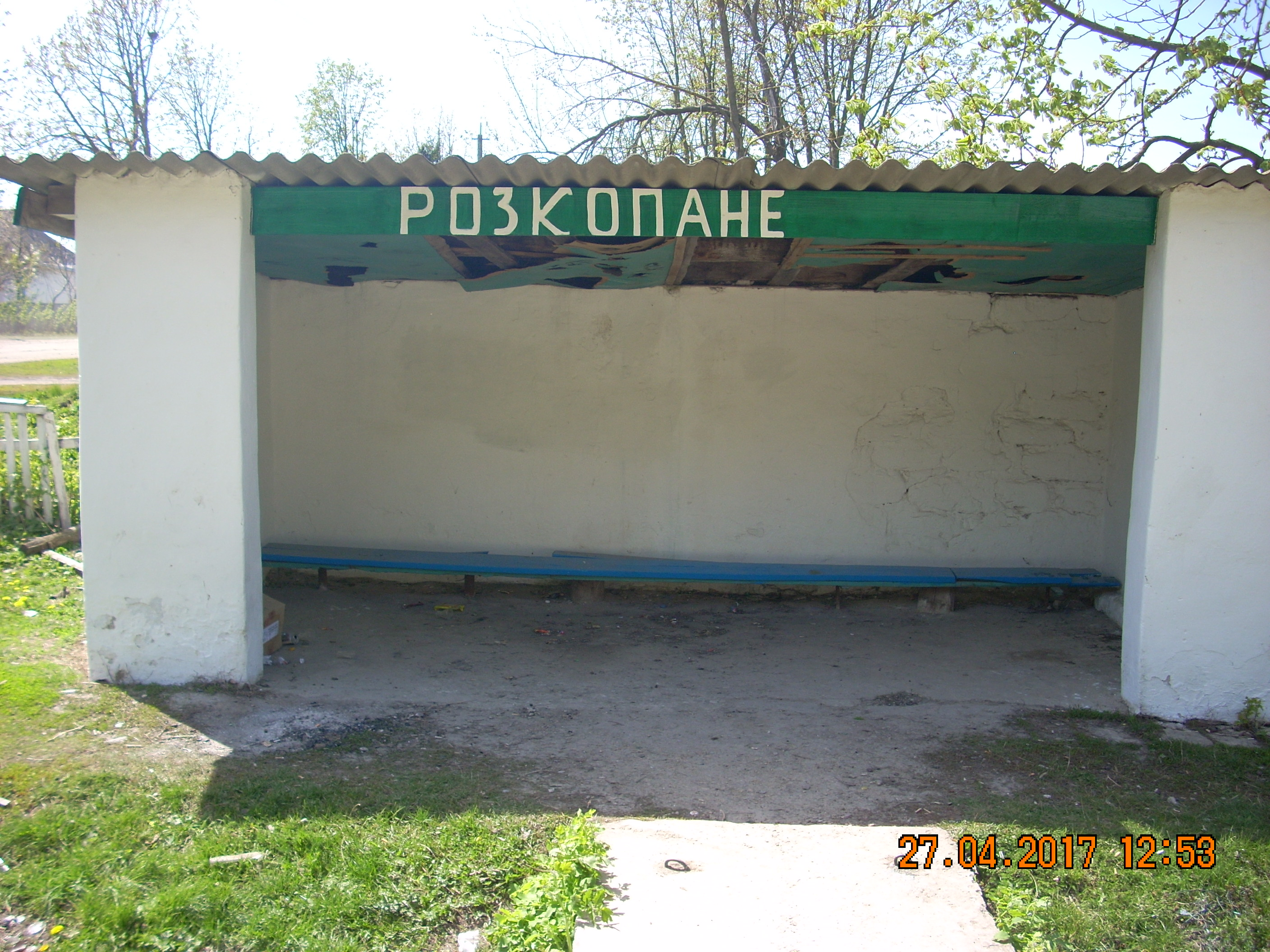 Автобусна зупинка Розкопане